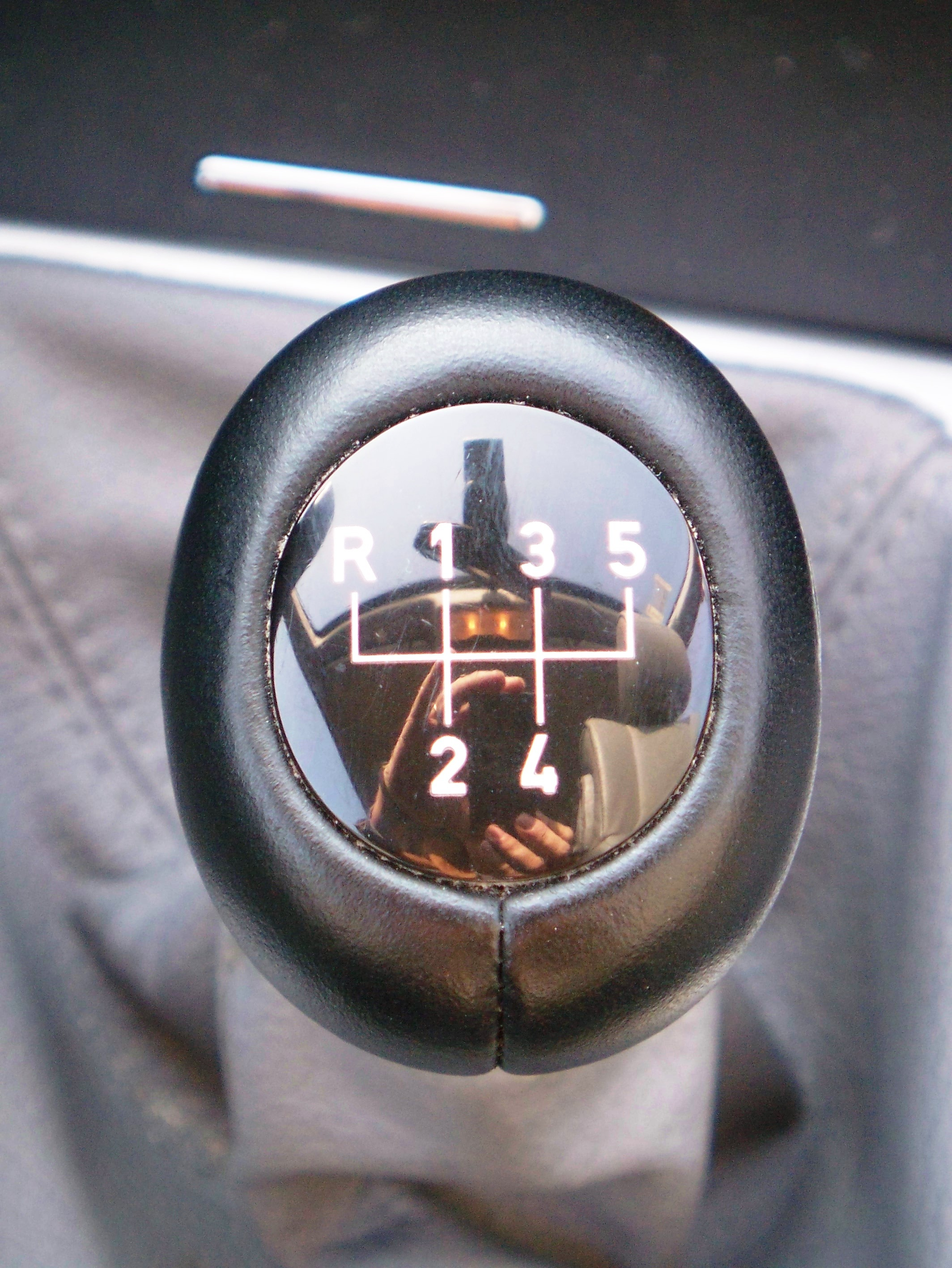 Alavanca de 5 velocidades